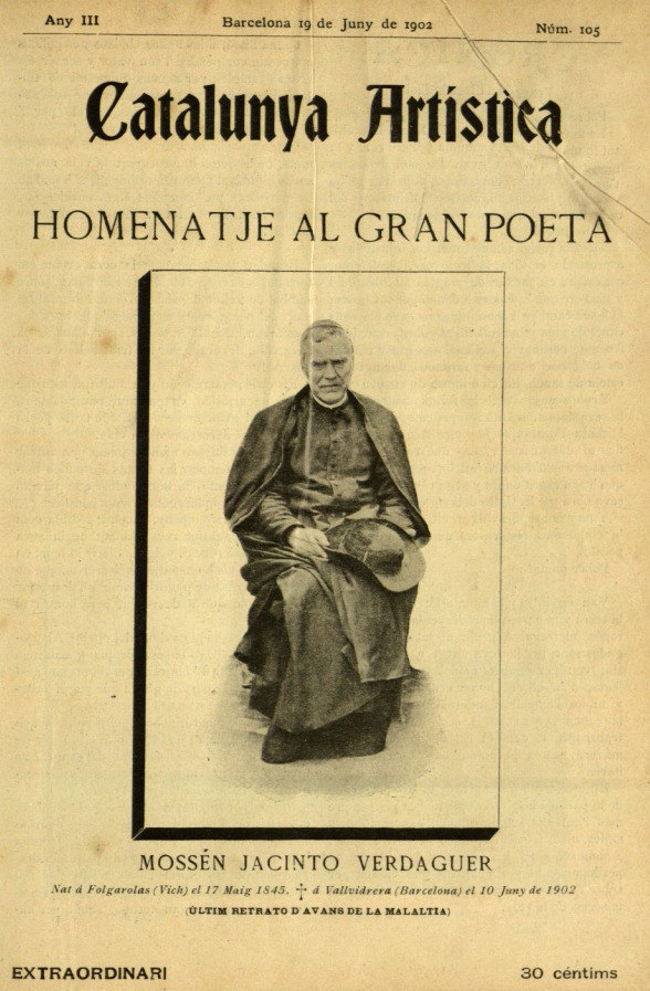 Portada d'un número especial dedicat a Jacinto Verdaguer de la revista Catalunya Artística